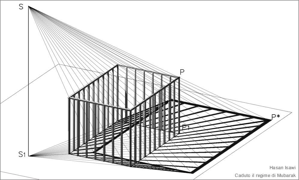 Ombre prodotte da una sorgente propria e' una proiezione centrale (prospettiva). Ponendo il punto di vista in modo che sia coincidente con la sorgente luminosa S, l'immagine percepita dall'osservatore coinciderebbe con la stessa ombra prodotta da S. Nel caso mostrato in figura, e' una prospettiva a quadro orizzontale. In cui la prima proiezione S1 della sorgente S coincide con la fuga delle rette ortogonali al piano orizzontale pi-greco (coincidente con il primo piano di proiezione pigreco1); La prima proiezione P1 del punto P coincide con la traccia della retta verticale z passante per P. Per cui Unendo la fuga S1 con la traccia di questa retta z, otteniamo l'immagine z' di z.